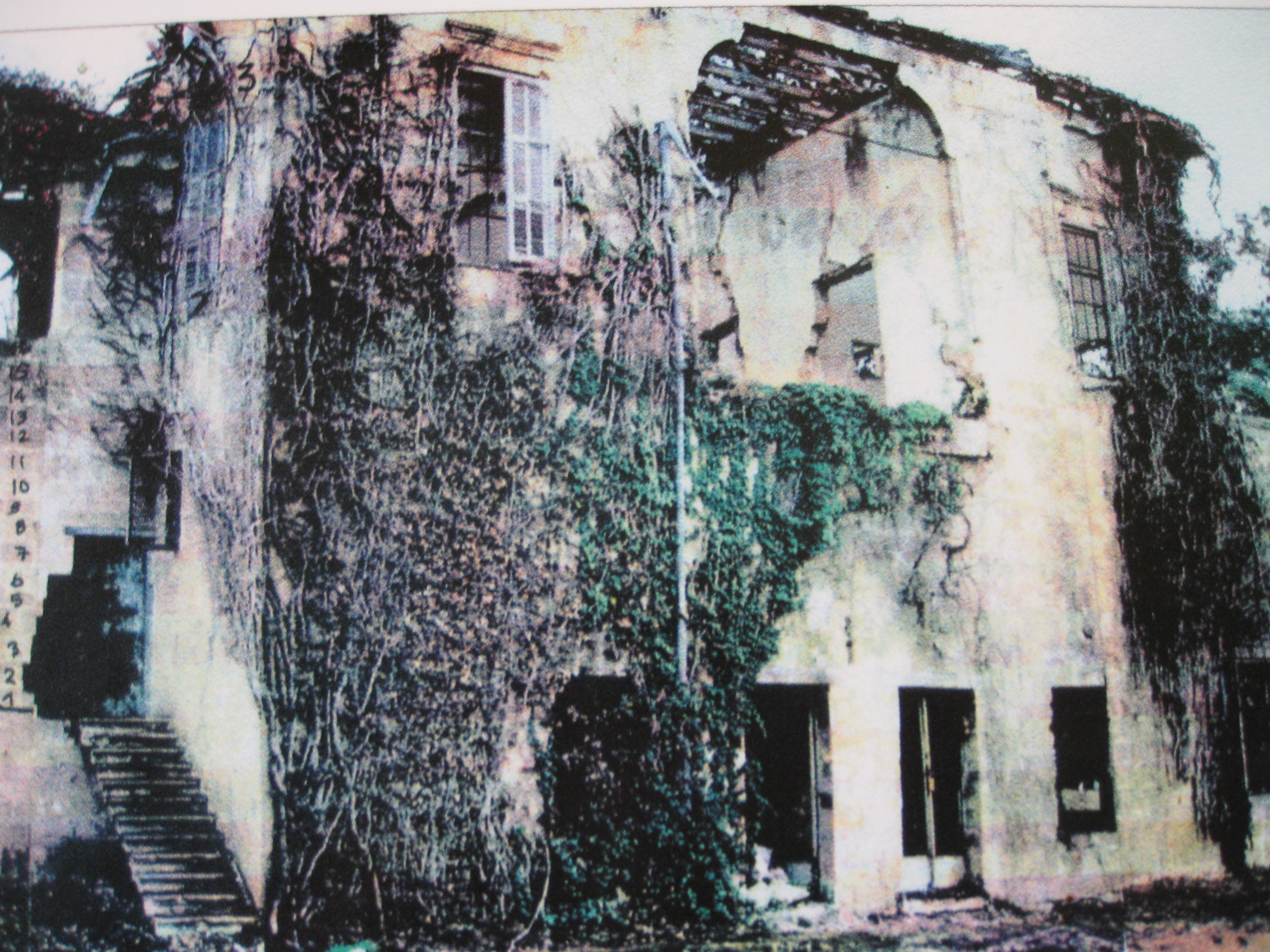 Nahariyya - Liberman House Museum - Historical images of Nahariyya נהריה בית ליברמן - מוזיאון להיסטוריה של נהריה - תצלומים היסטוריים של נהריה